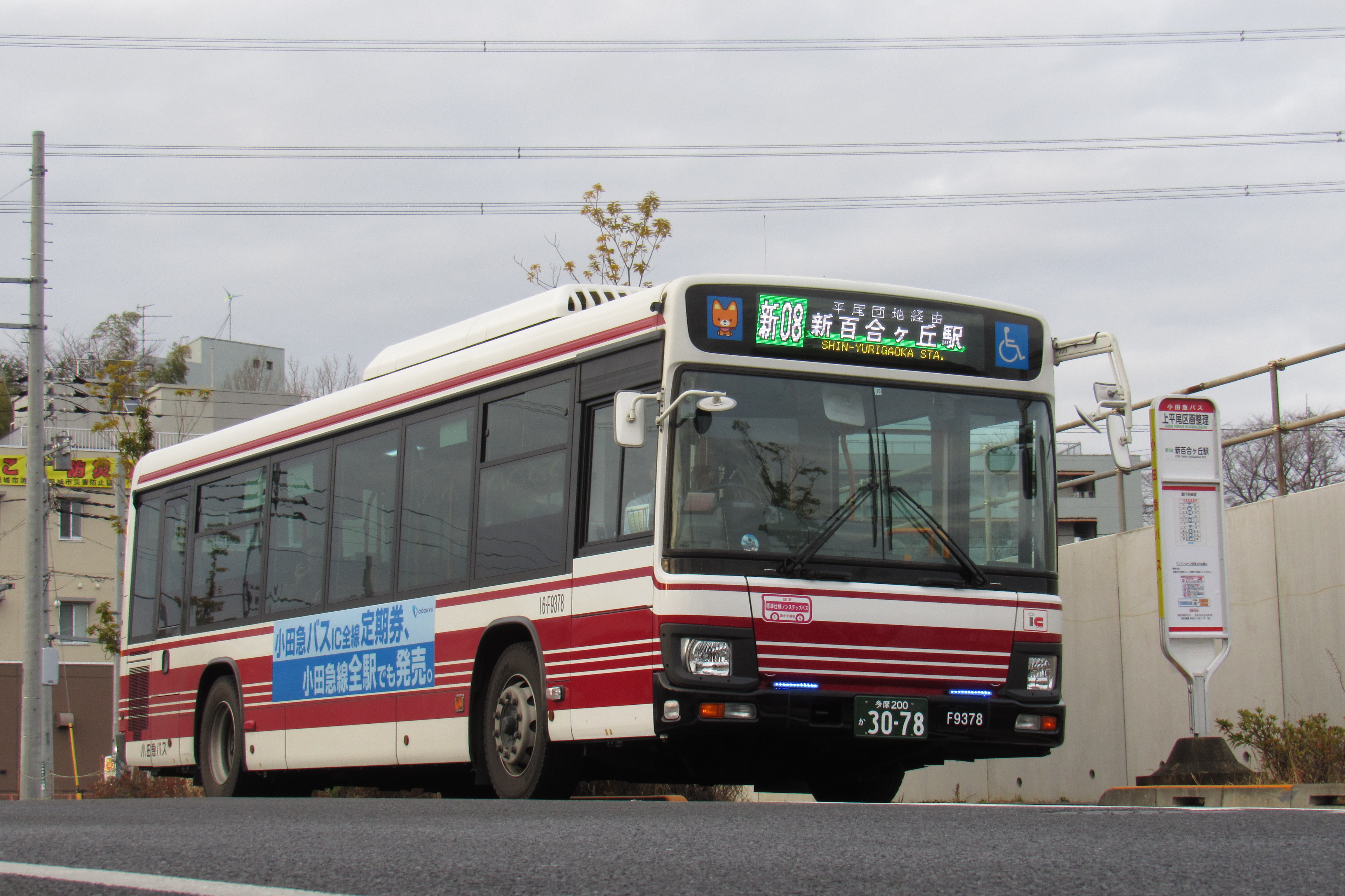 小田急バス16-F9378号車